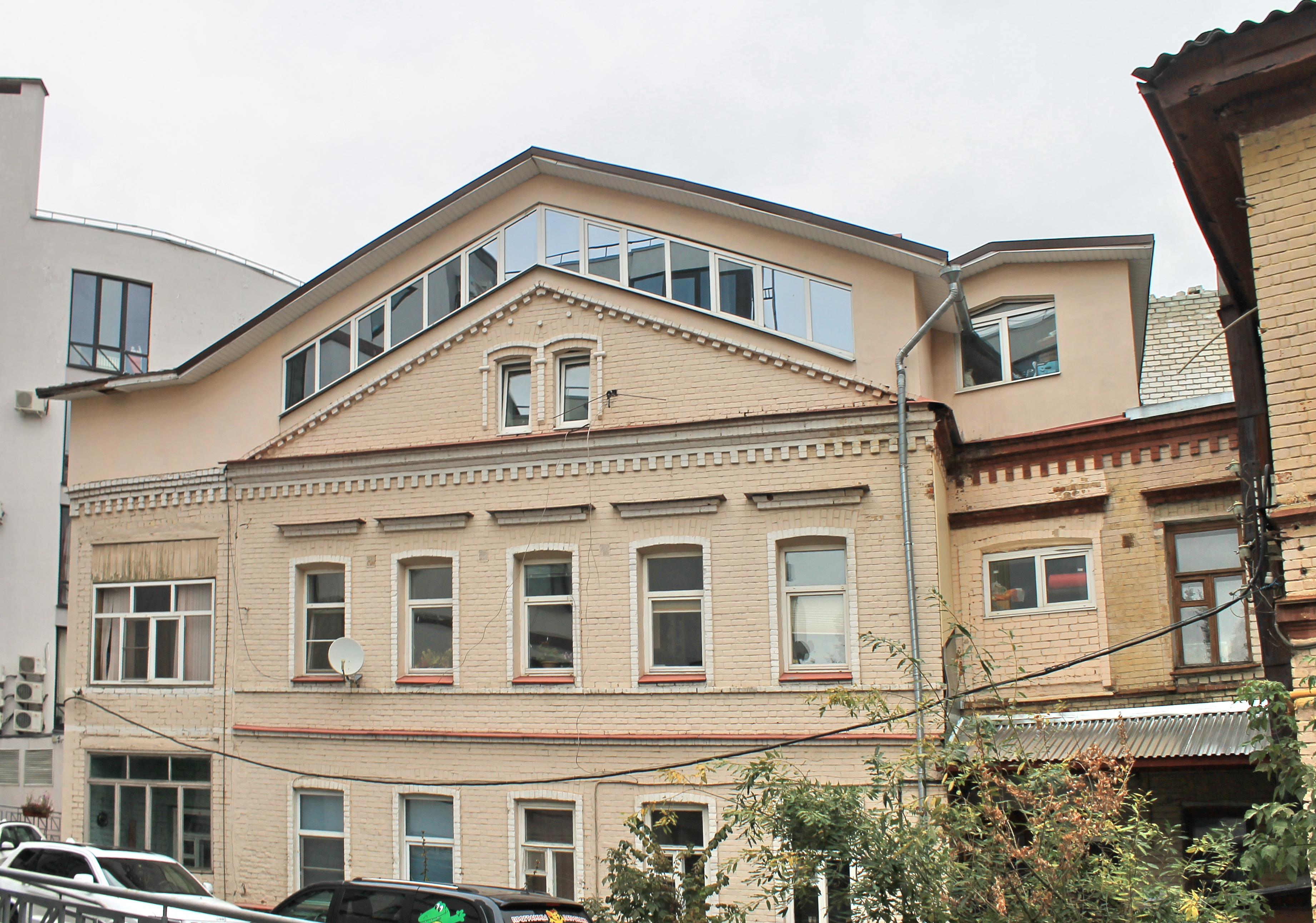 Жилой дом: улица Пискунова, 32, Нижний Новгород, Нижегородская область